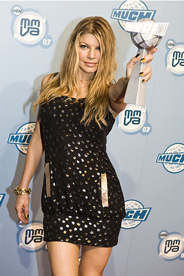 MMVAs